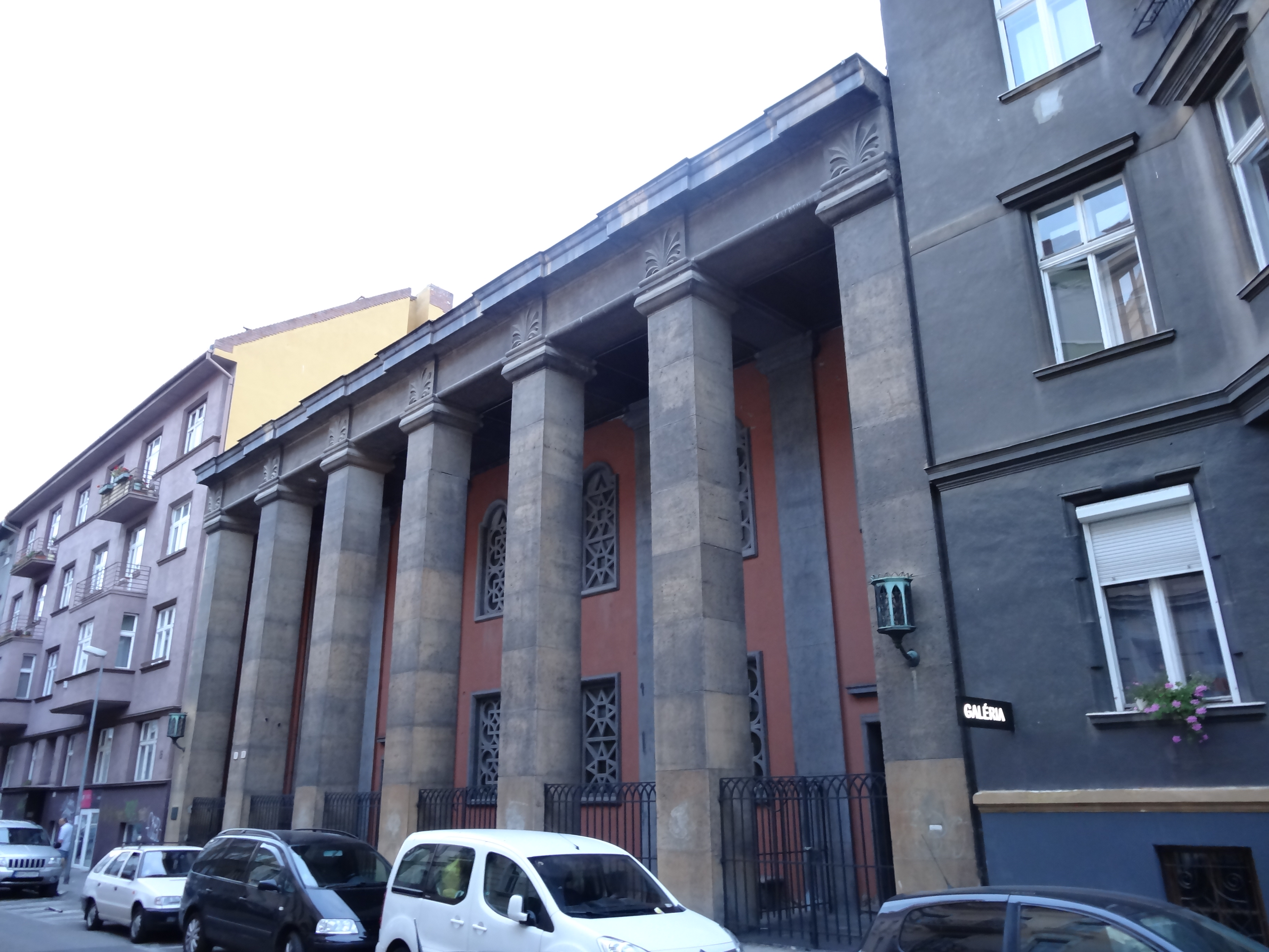 Bratislava (agost 2012)